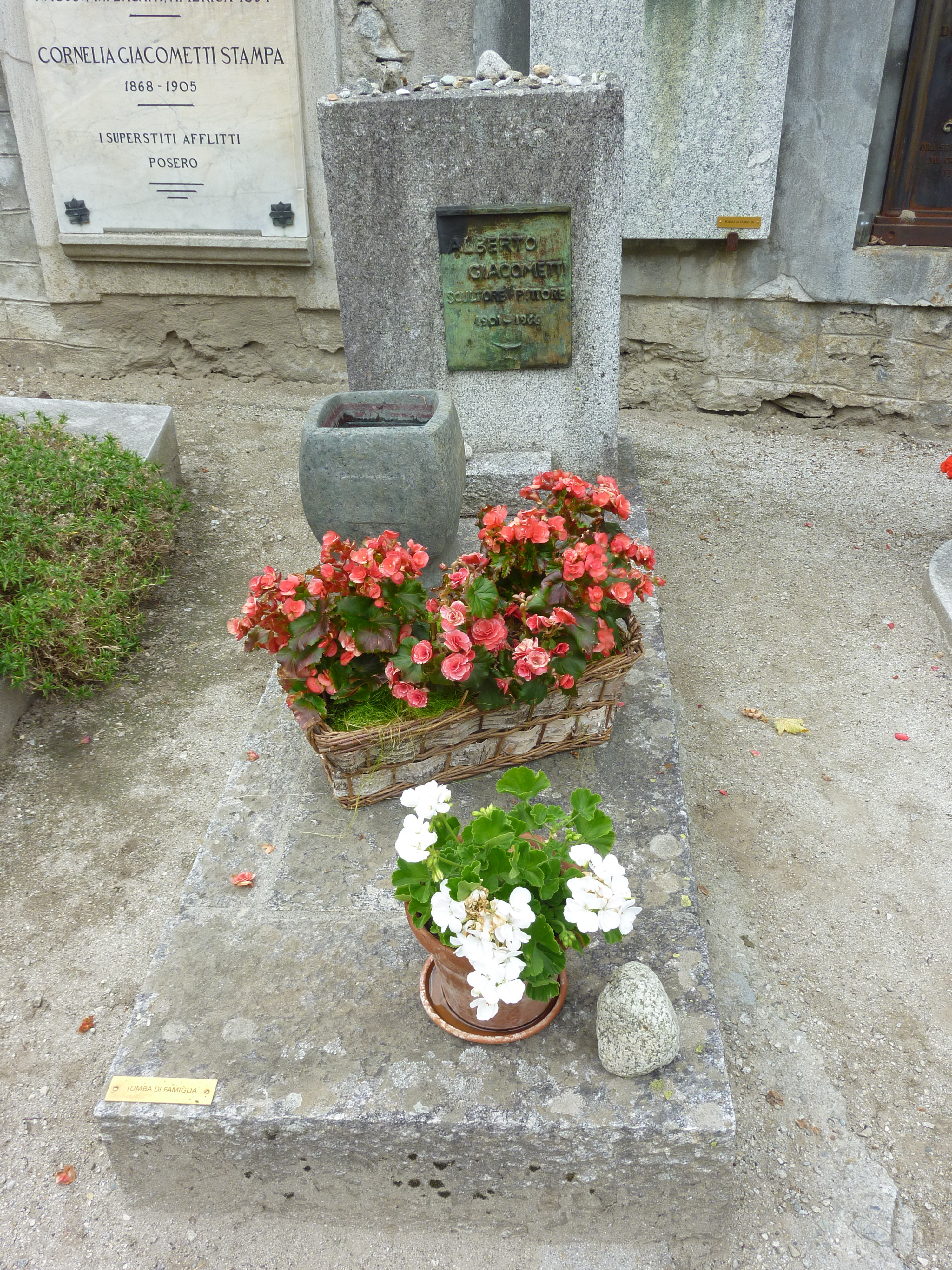 Alberto Giacomettis Gran in Borgonovo bei Stampa GR